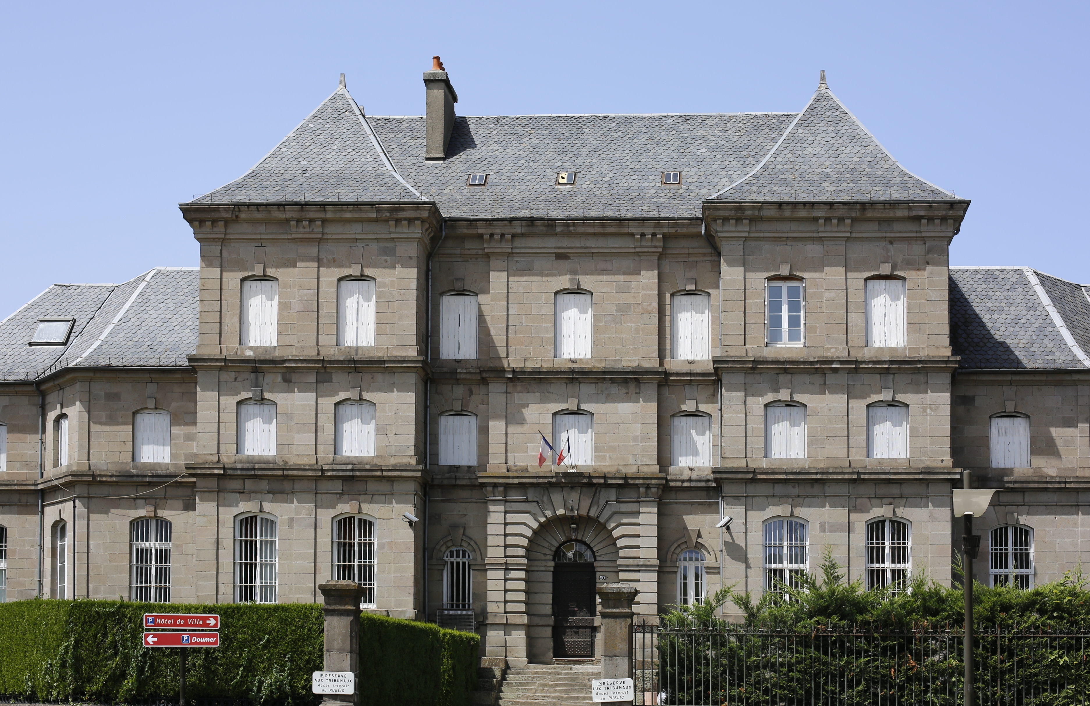 Prison d'Aurillac. .